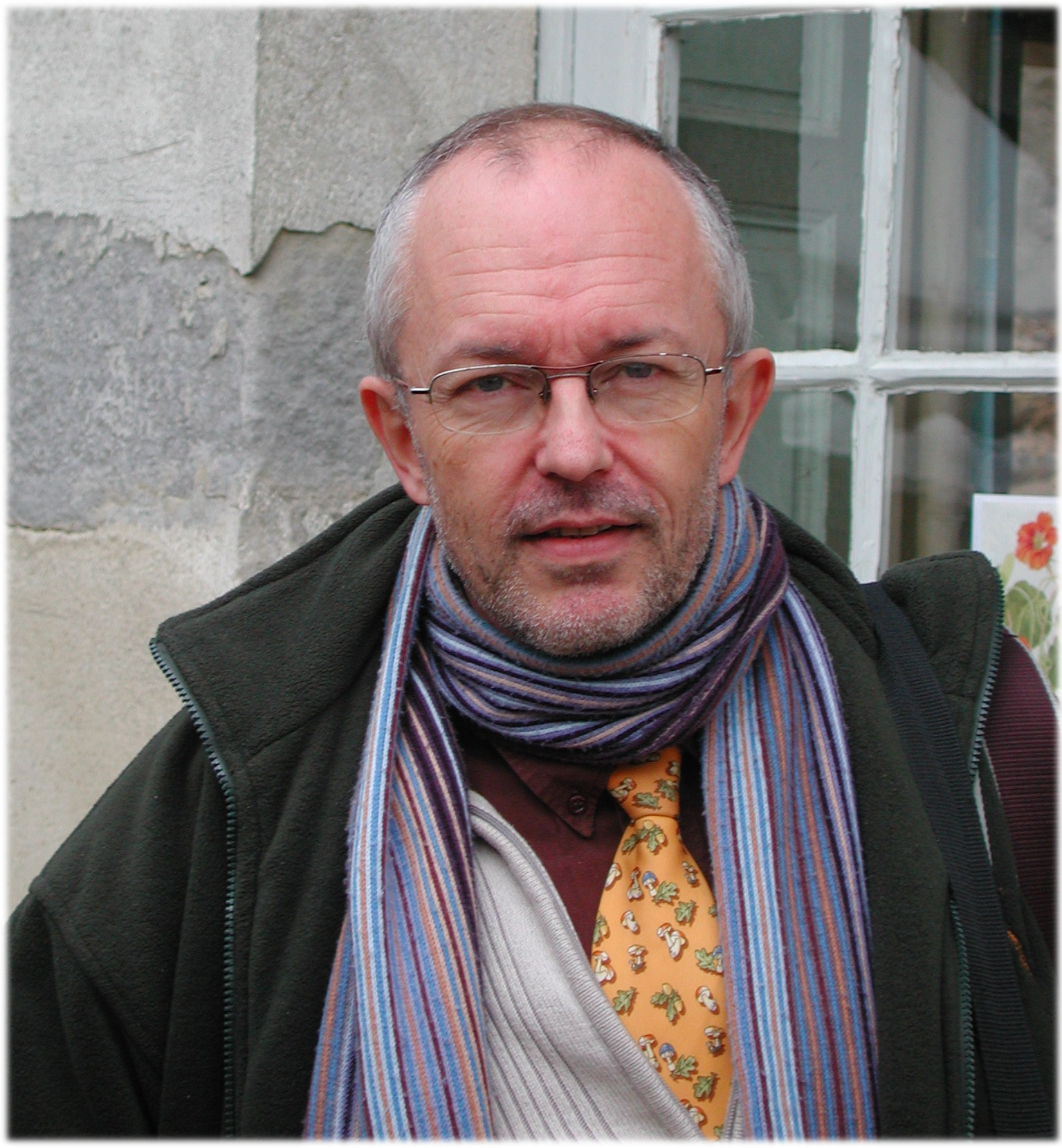 Photo de Régis Courtecuisse, mycologue français de réputation internationale